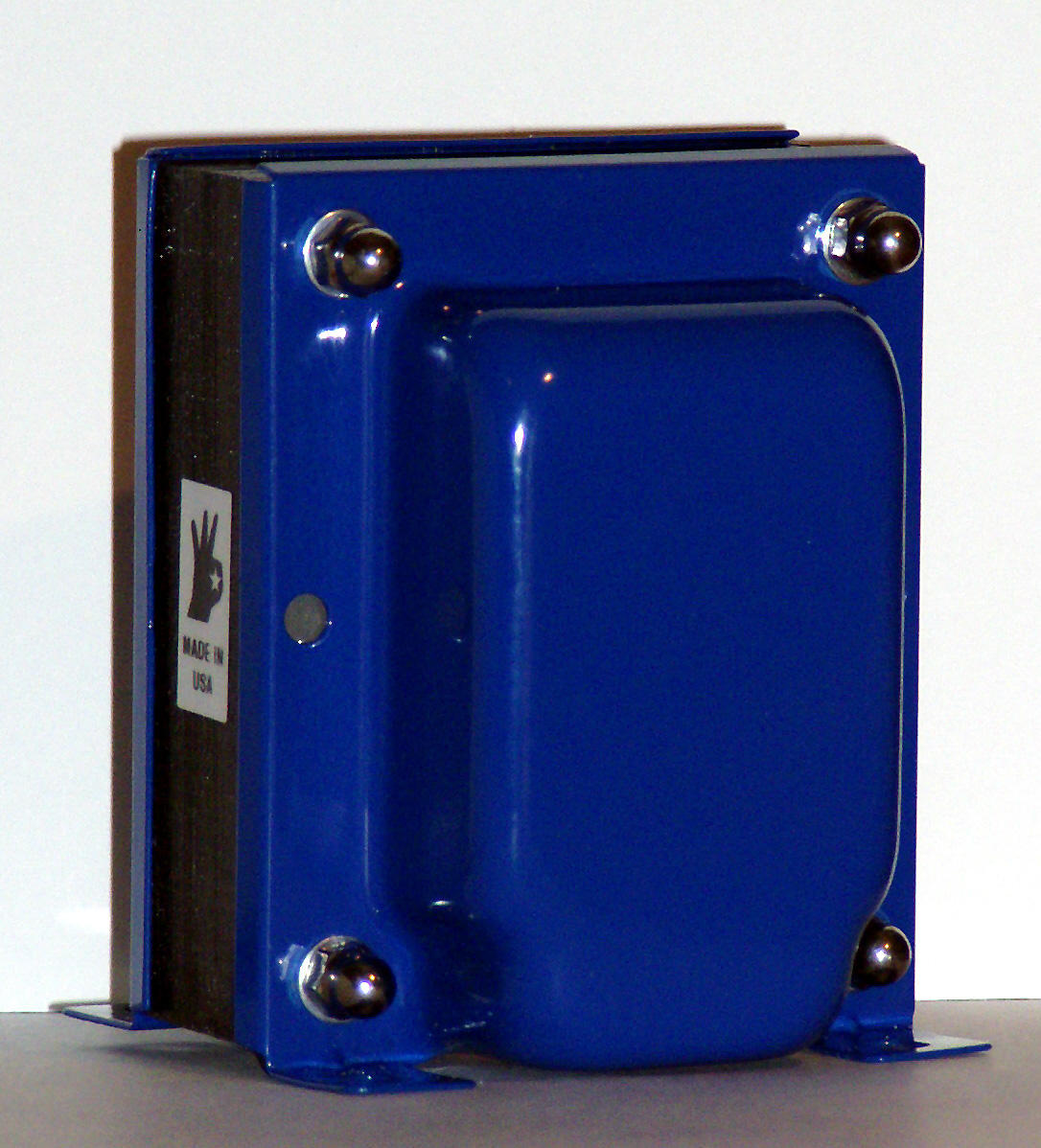 Ausgangstransformator für Röhrenverstärker